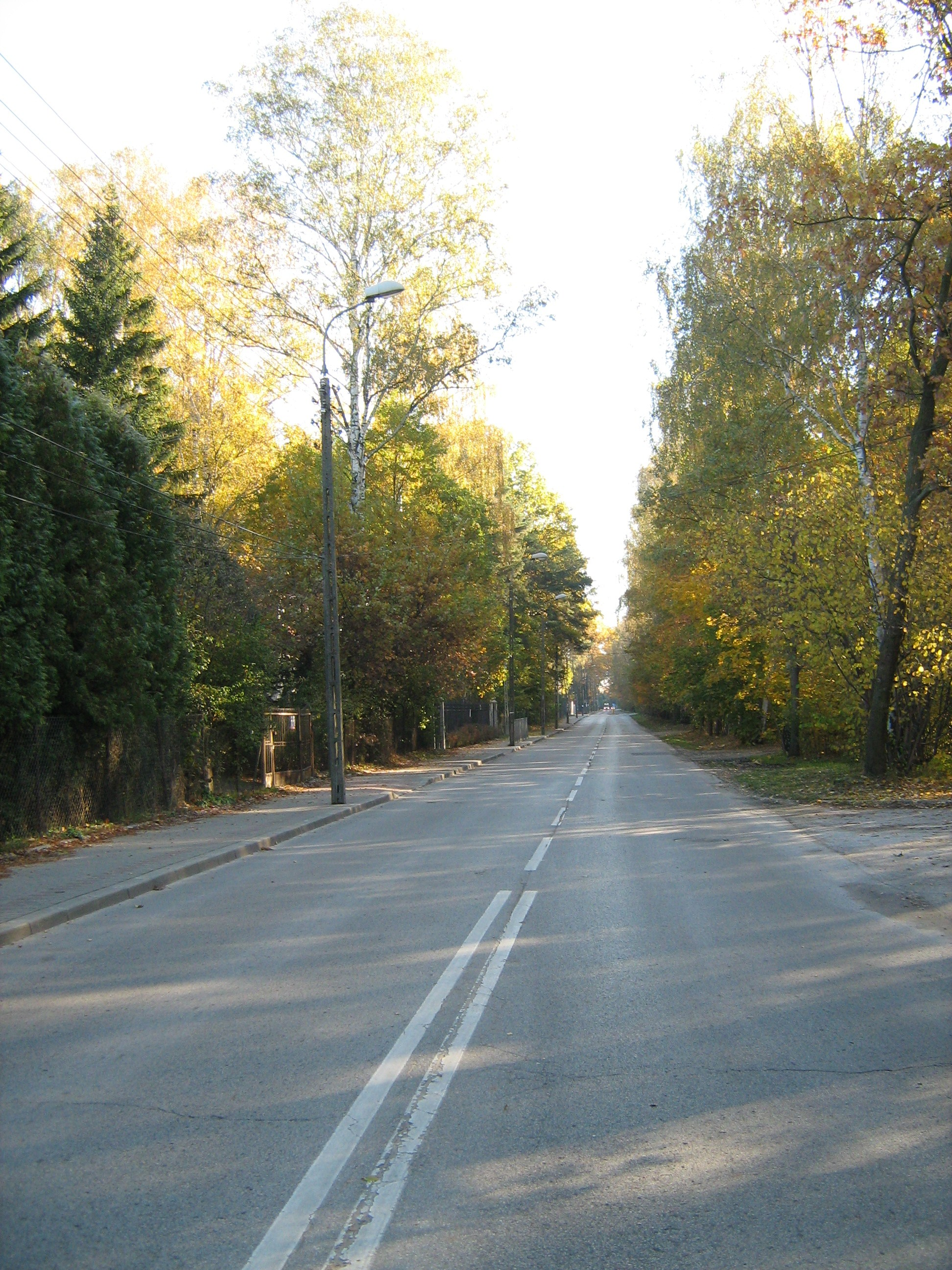 Armii Krajowej street in Warsaw Wesola (Poland) ulica Armii Krajowej w Warszawie-Wesołej